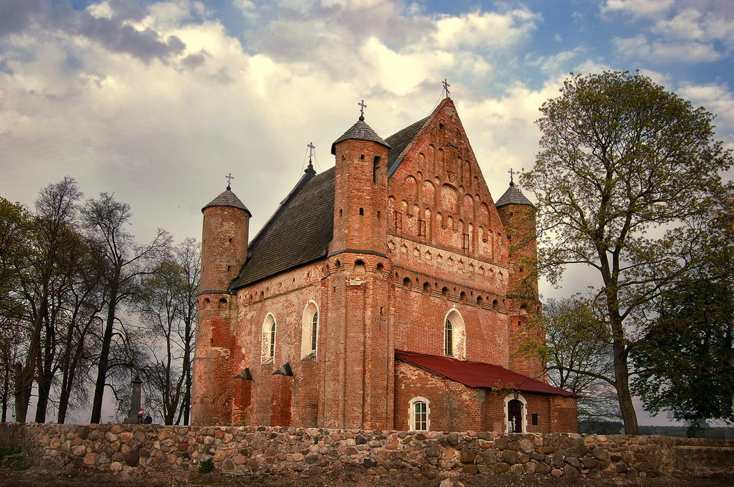 Беларуская (тарашкевіца): Царква абарончага тыпу. в. Сынкавічы This is a photo of Belarusian heritage monument. Reference number: 410Г000282 ( WLM)